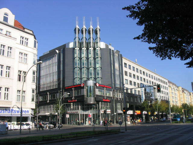 Description: Geschäfthaus Quasar. Bauzeit 1991-1994. Architekten Shin Takamatsu und Elie Lahjani. Modern building at Frankfurter Allee in Berlin. Source: self-made. I release it into the public domain. Gryffindor 01:43, 10 March 2006 (UTC)